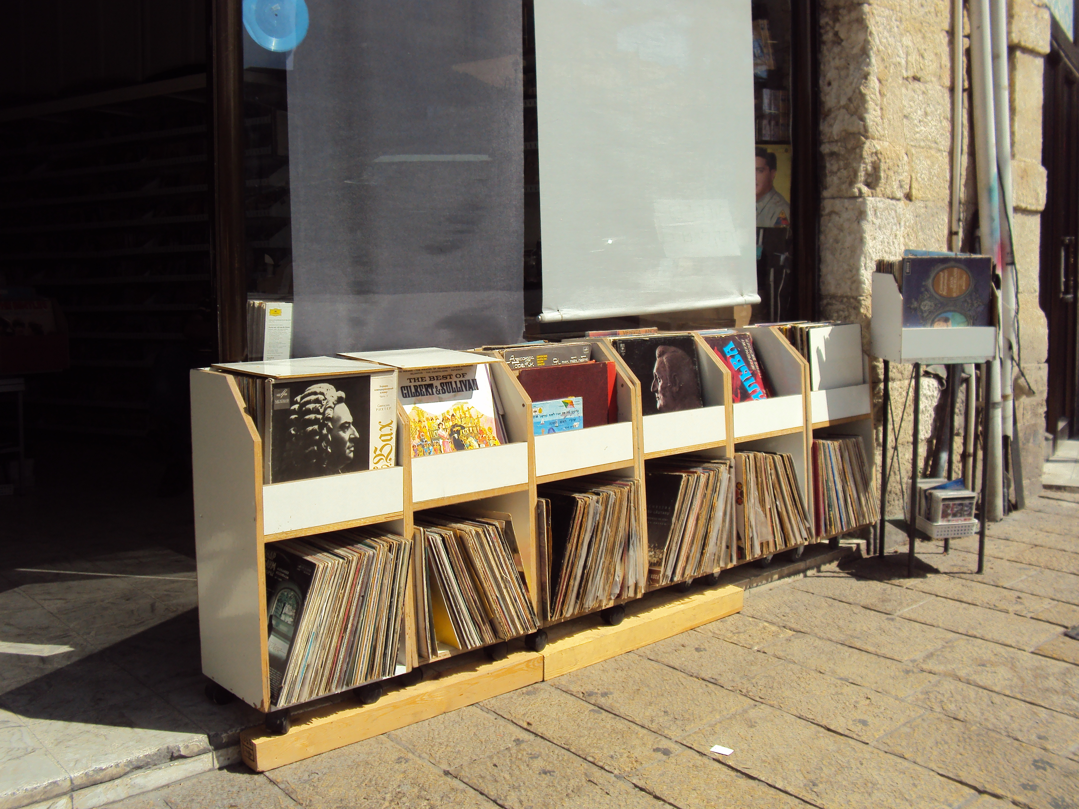 חנות לאספני תקליטי ויניל, יפו, ישראל